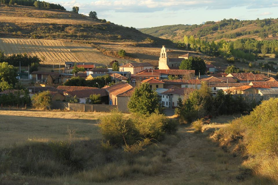 Foto del pueblo de Valdealcón, provincia de León - España